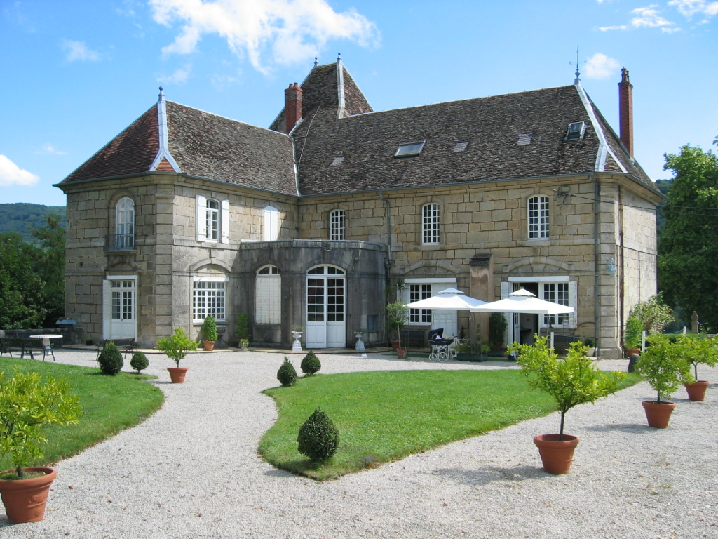 Château & Jardins de Vaire-Le-Grand - Franche Comté - France